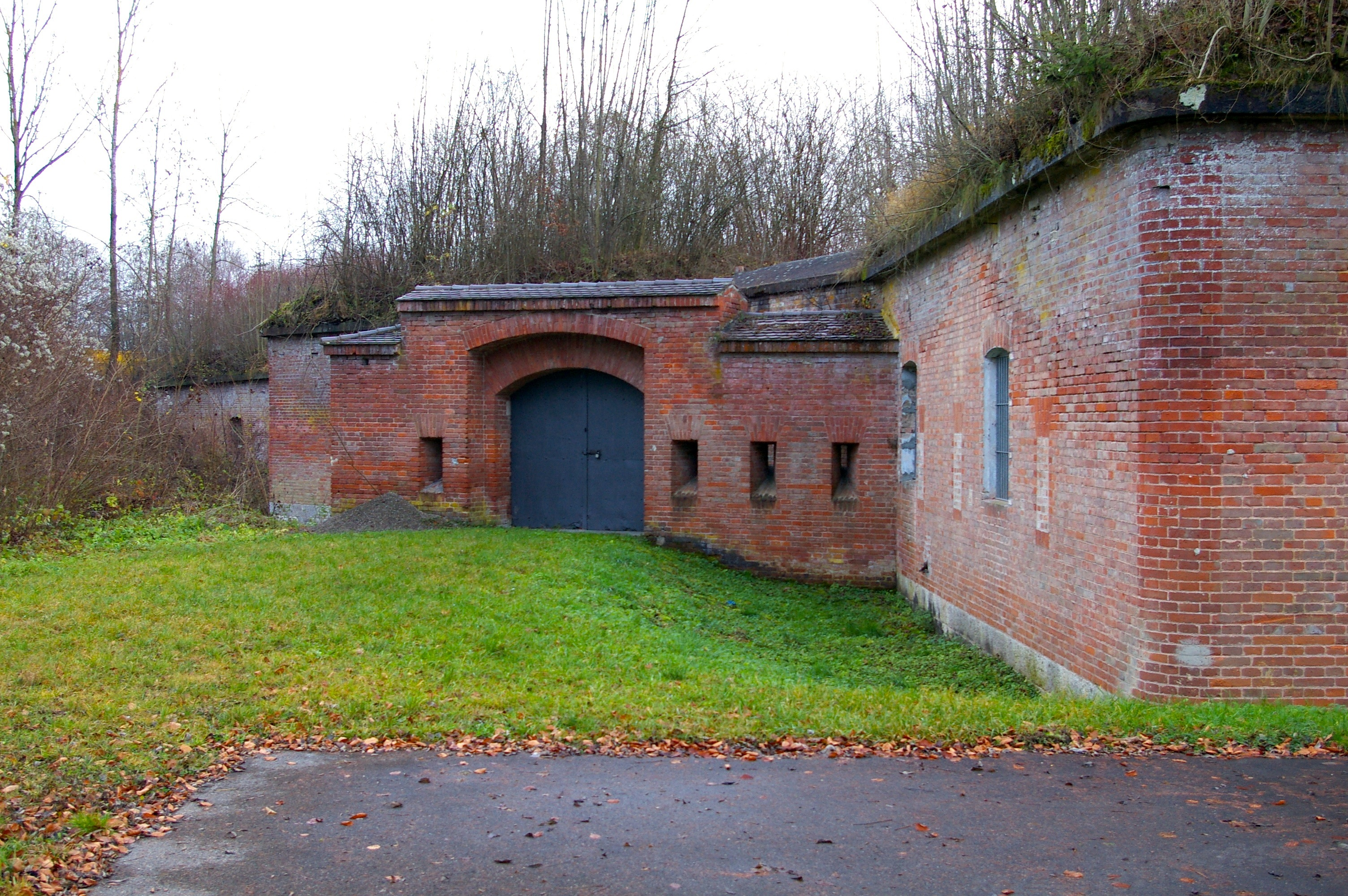 Kehlseite des Vorwerks Illerkanal